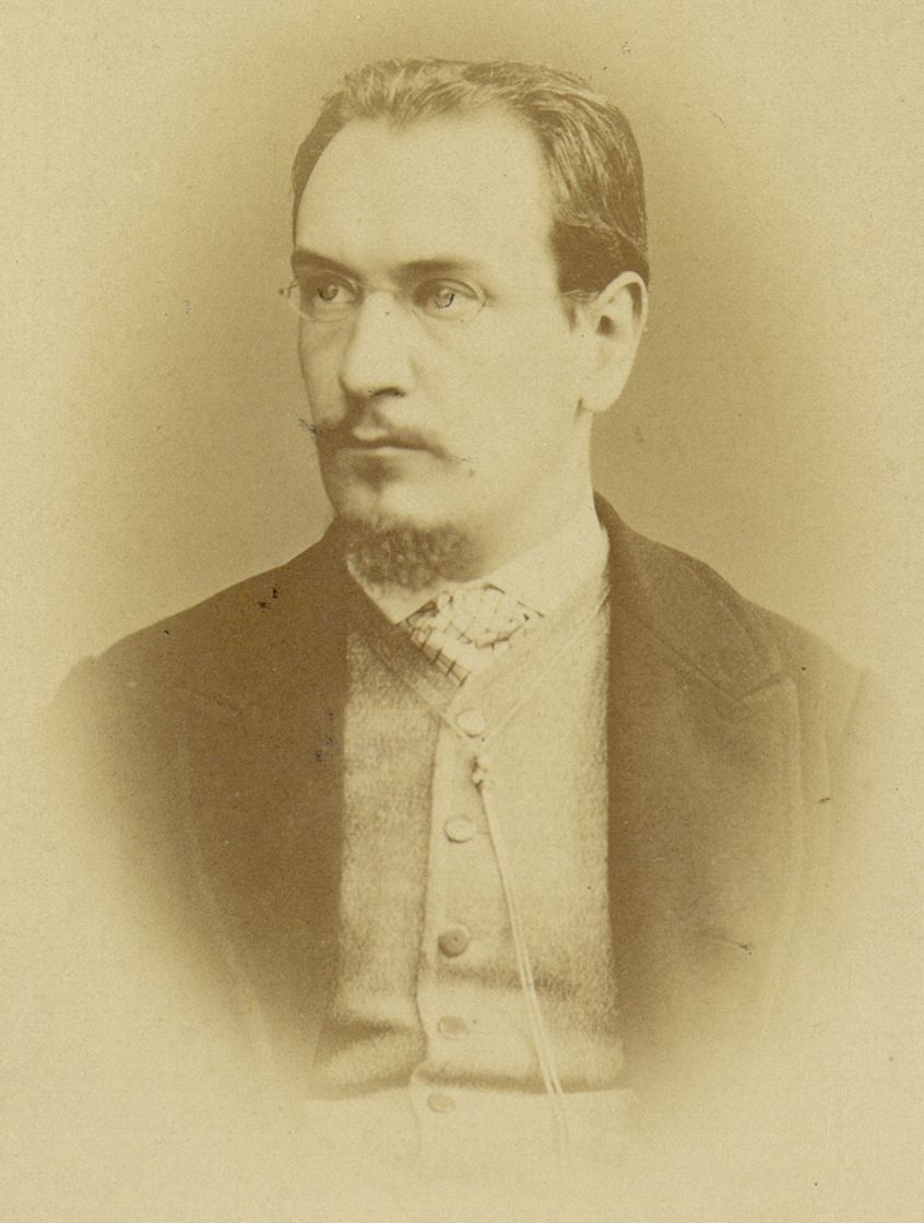 Peter Grasselli (1841-1933), Slovene politician.